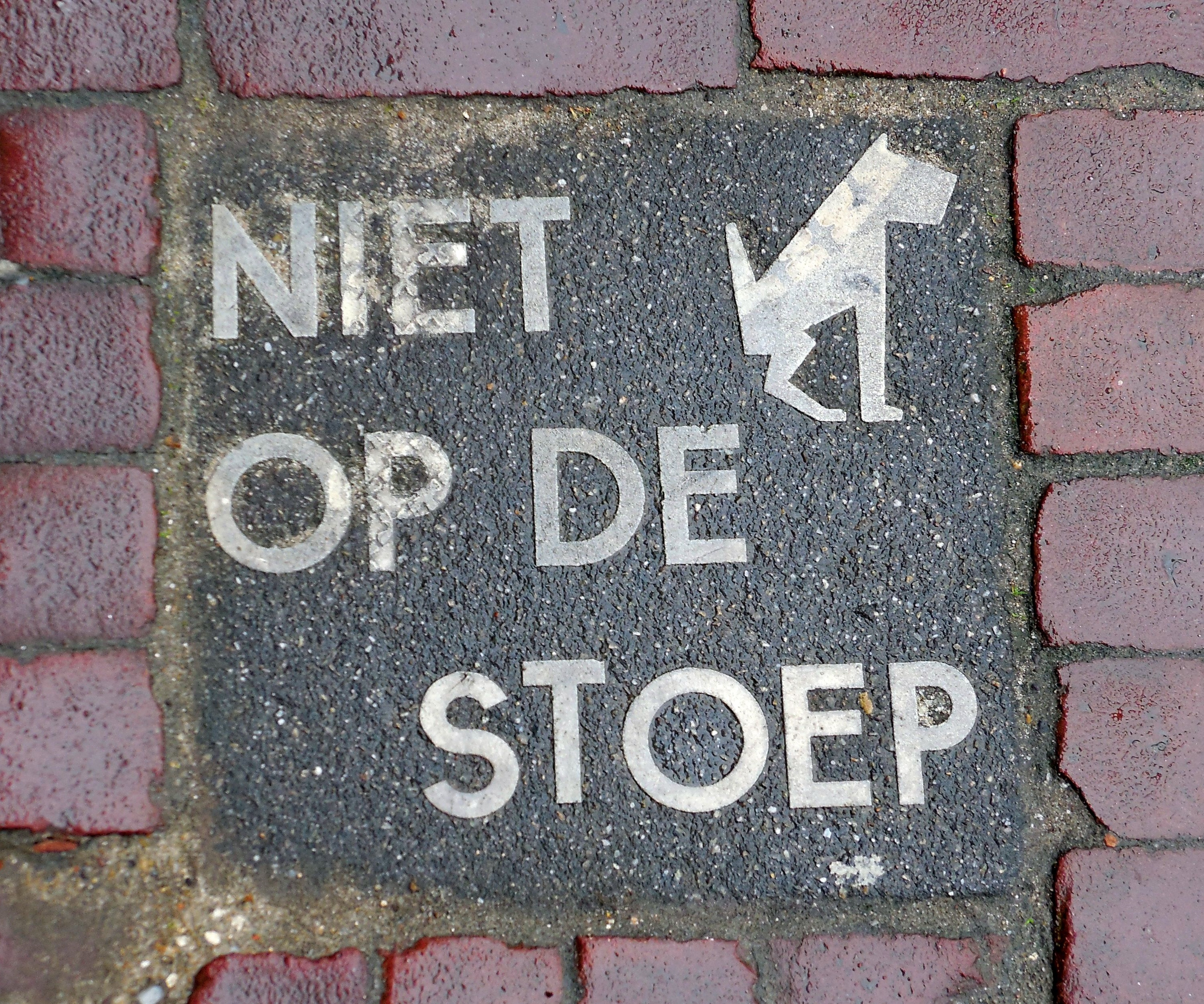 Plasterstein in Gouda (Niederlande), "Nicht auf dem Bürgersteig"